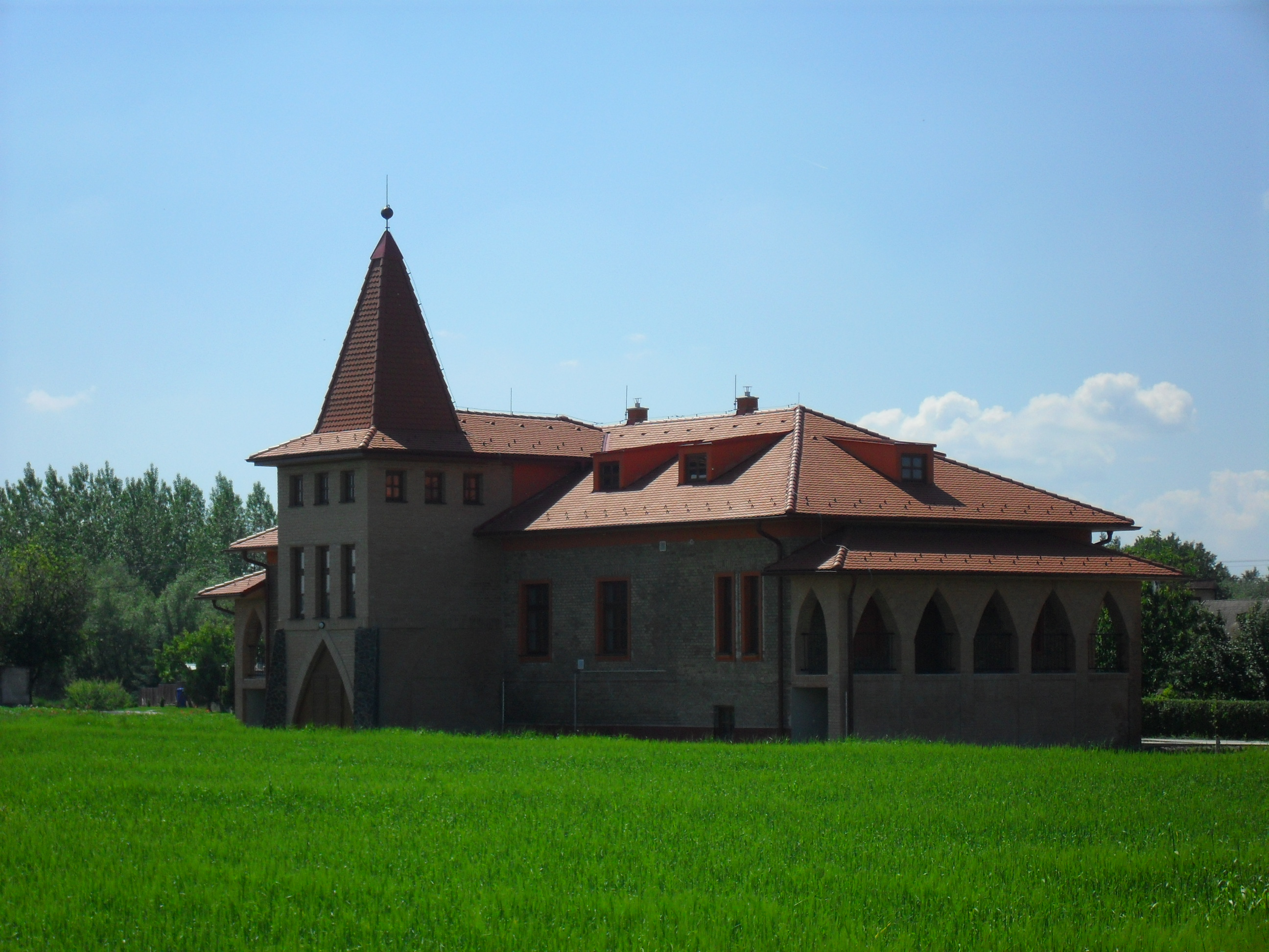 Megyercs - a helyreállított egykori Boschán-kúria